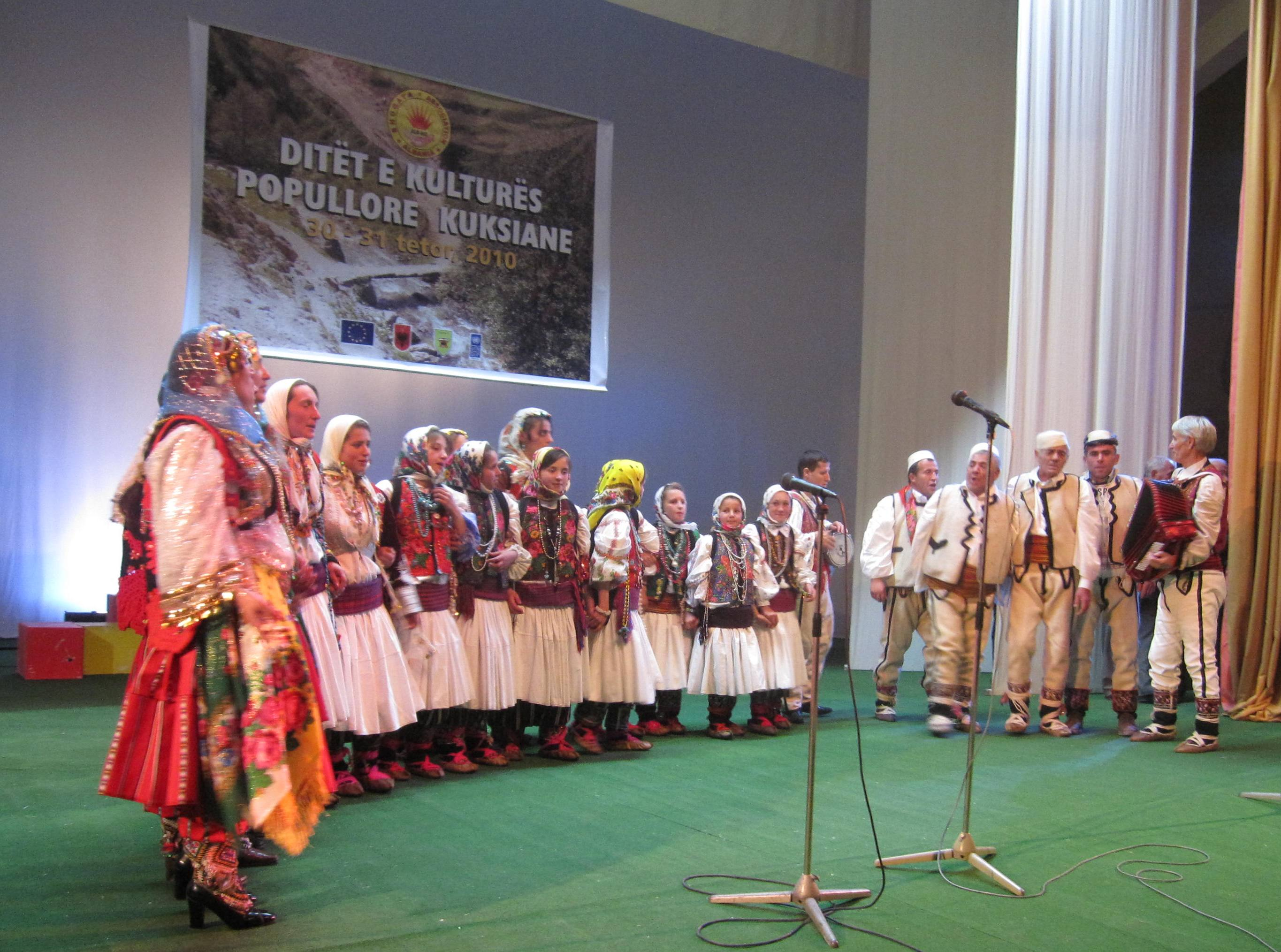 Veshja Tradicionale e Gorës